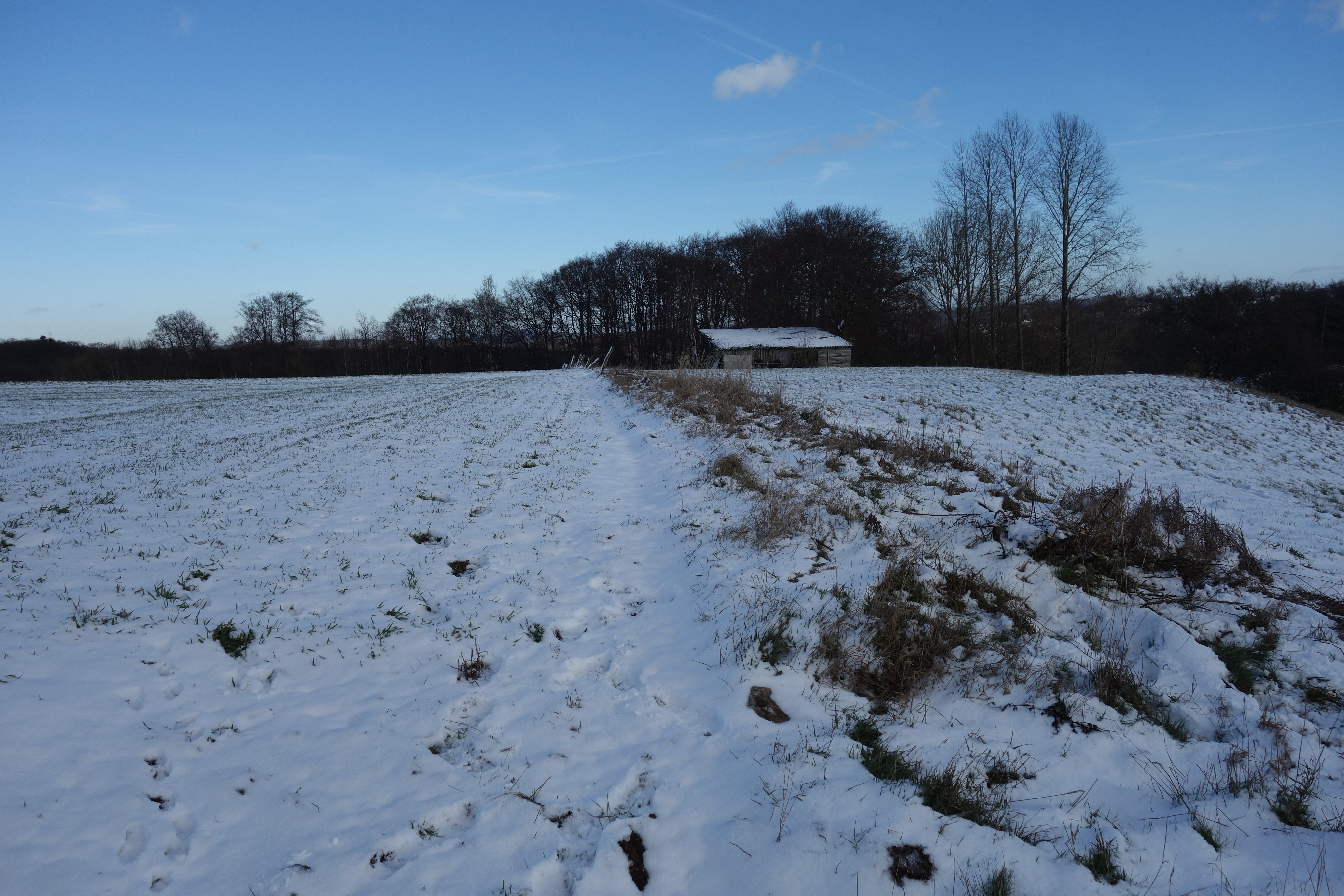 Grünland gehört zum Landschaftsschutzgebiet Heidepost / Steintwisten und Niedernfeld, Wald im Hintergrund zum Geschützter Landschaftsbestandteil Feldgehölz nördlich des Mühlenberges Gute Bilder Erweitert ...